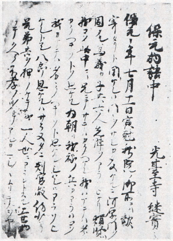 『保元物語』文保本巻頭。